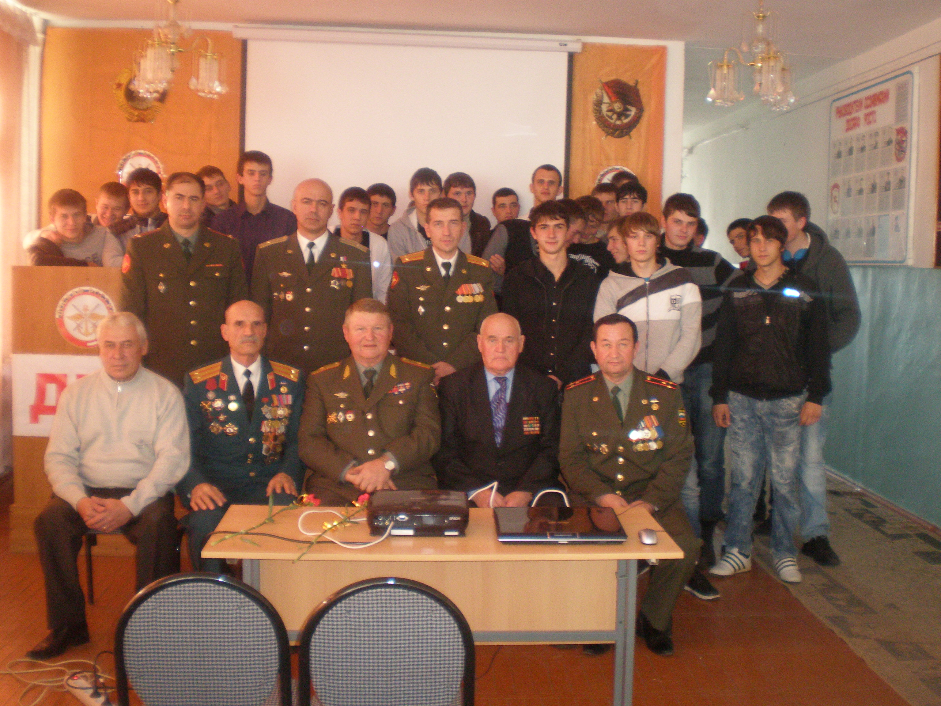 РОСТО-ДОСААФ Адыгеи. Встреча генерала Дорофеева А.А. и Героя России Цеева Э.К. с курсантами автошколы. Майкоп 2011.